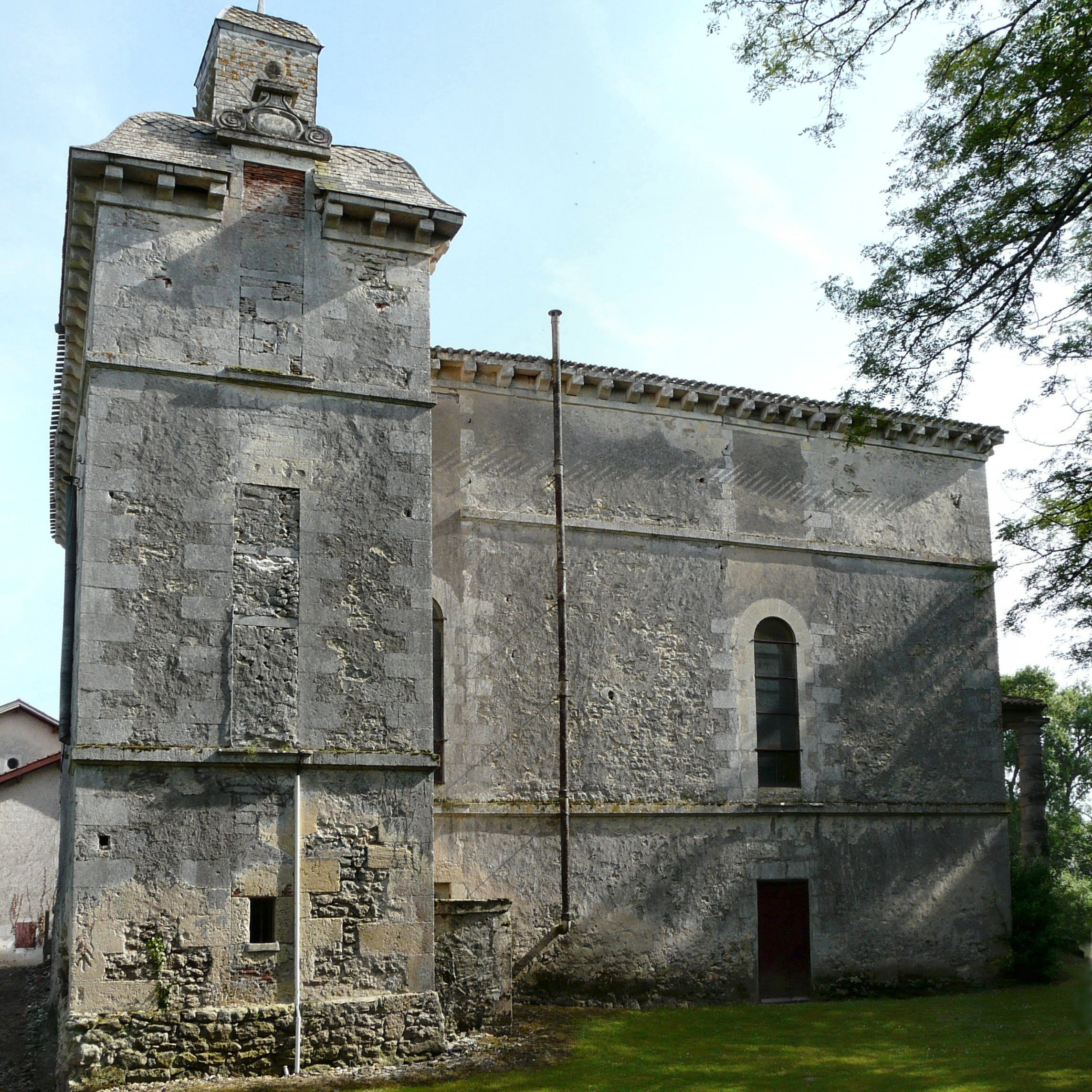 Temple protestant installé dans la partie subsistante du château du Fleix (Inscription) .